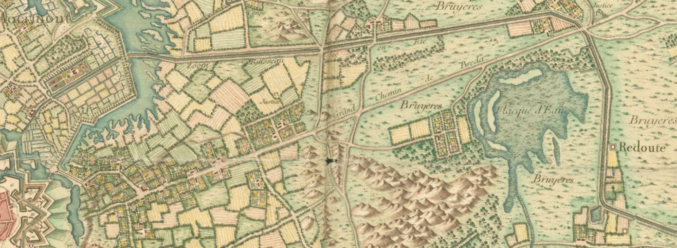 Noordelijke loop van De Zoom in 17897